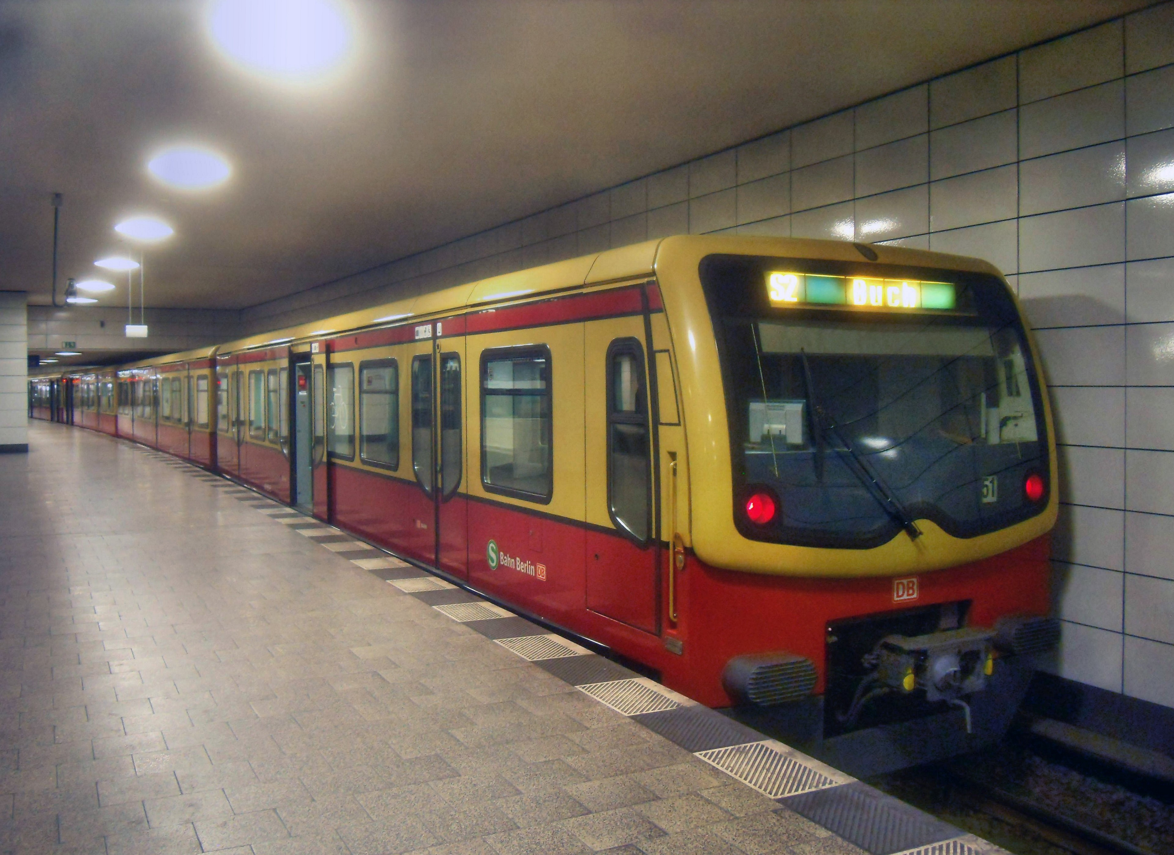 Triebwagen der DBAG-Baureihe 481/482 der S-Bahn Berlin auf der Linie S 2 im Anhalter Bahnhof auf dem Weg nach Buch in Berlin (Deutschland)